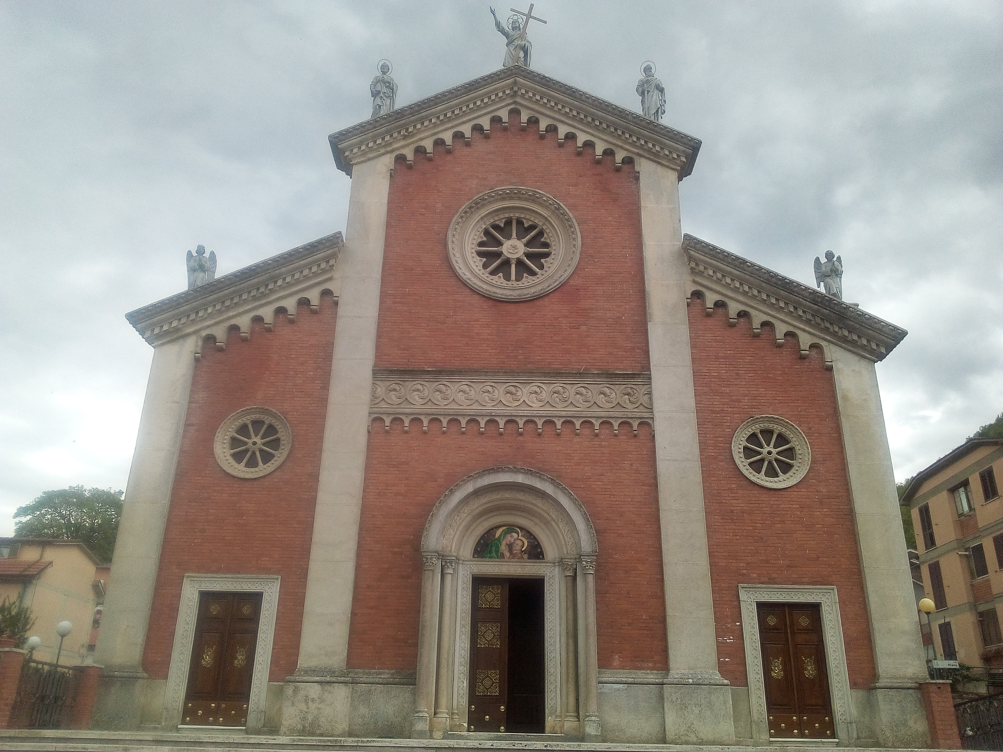 Chiesa di Santa Maria Nuova a Morino (Abruzzo)